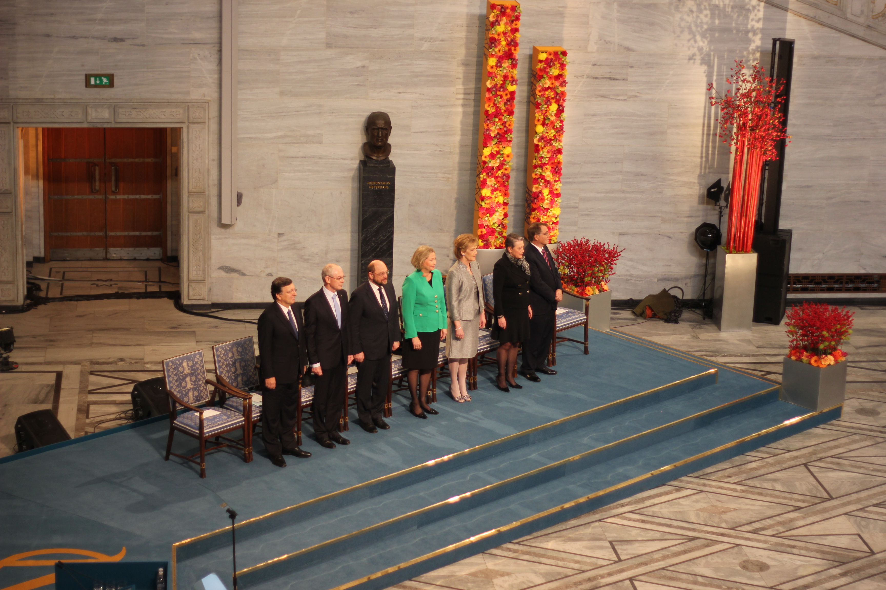 Ministru prezidents Valdis Dombrovskis Norvēģijas galvaspilsētā Oslo piedalās Nobela miera prēmijas pasniegšanas ceremonijā Eiropas Savienībai